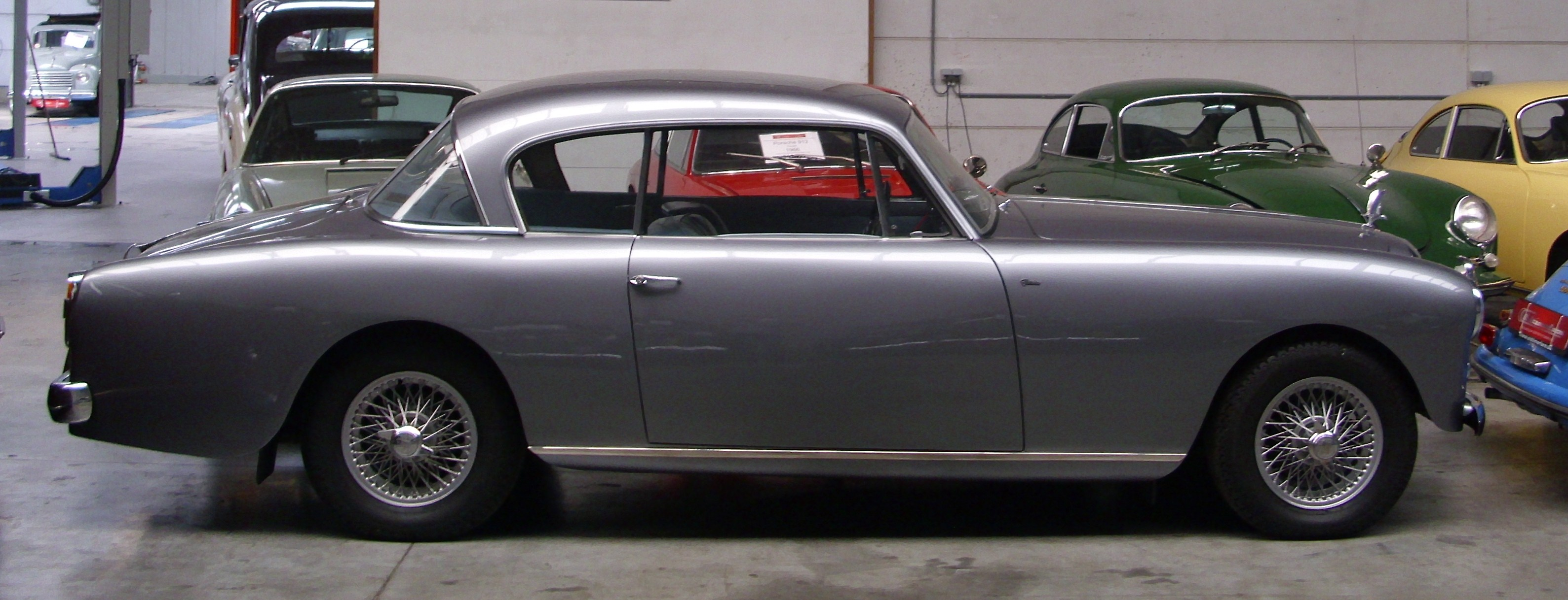 Alvis 3 Litres TC 108G Coupé von Graber 1955